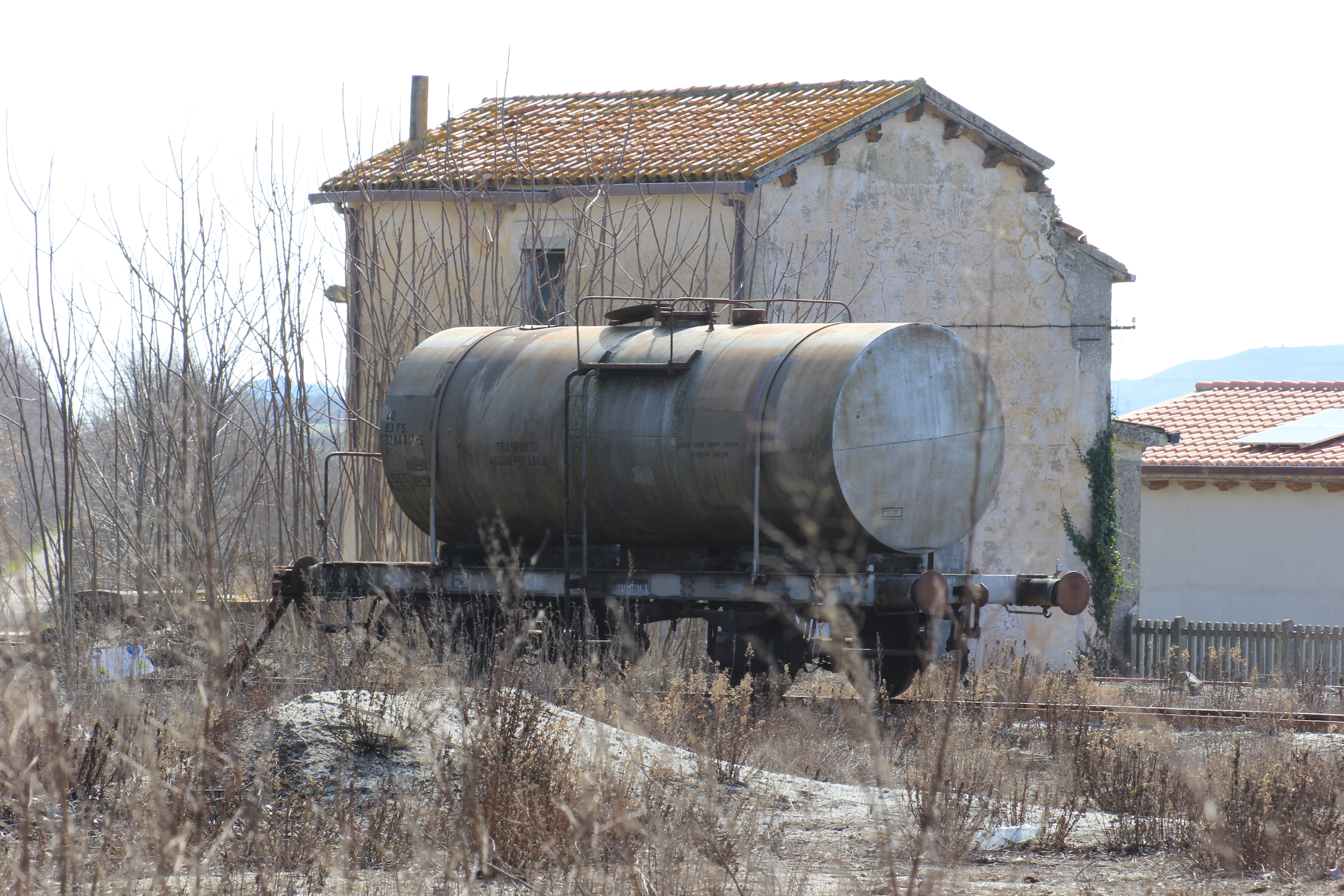 Macomer - Stazione di Campeda